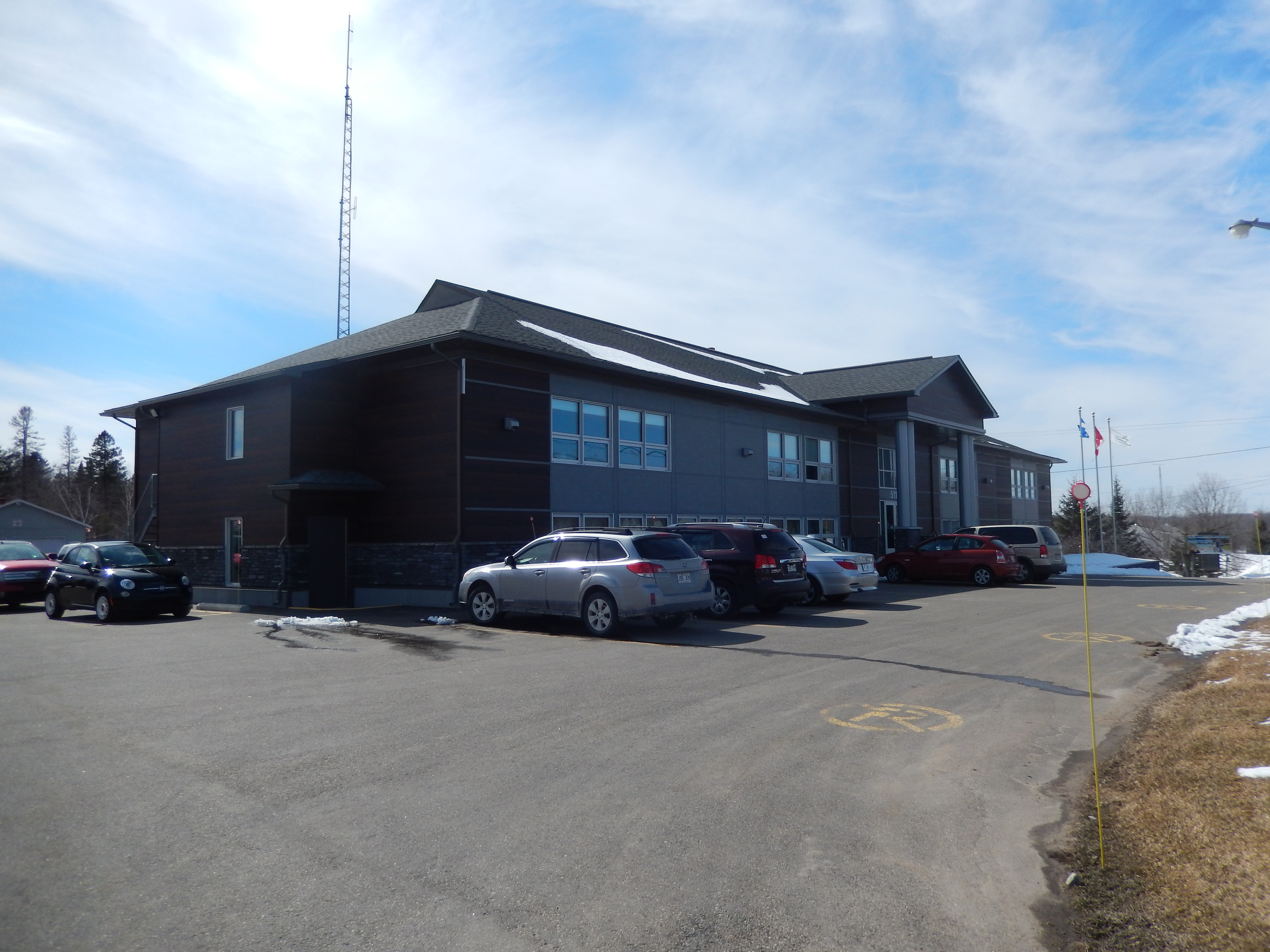 Mairie de Saint-Gabriel-de-Brandon, avril 2016.